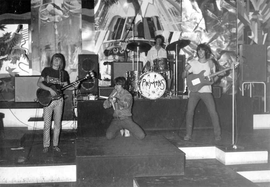 Jay Robert Farthing, Paul "Mal" Bradley Couling, Pique Withers e Dave Sumner al Piper Club.